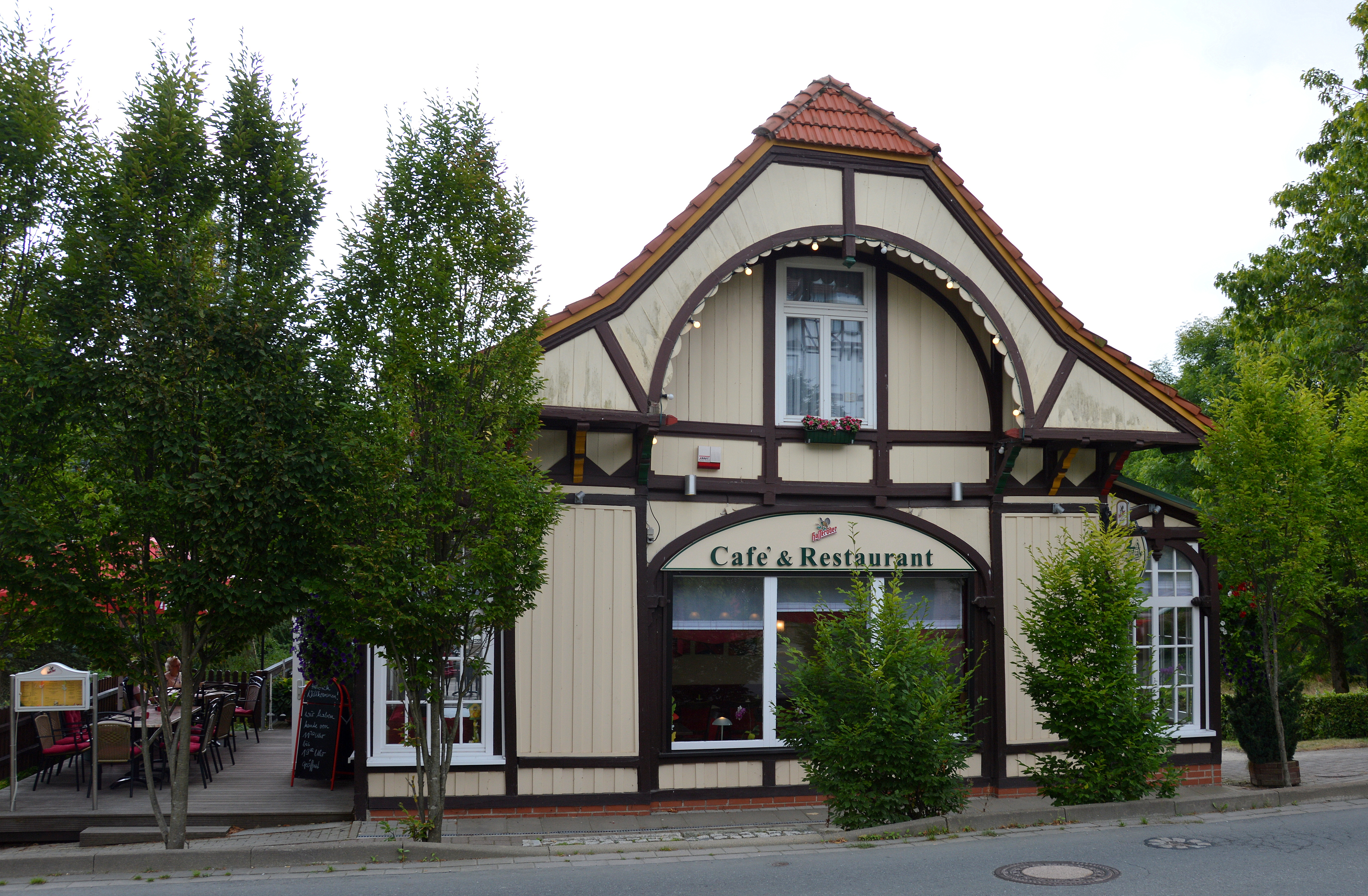 Haus Brockenstraße 8 in Schierke